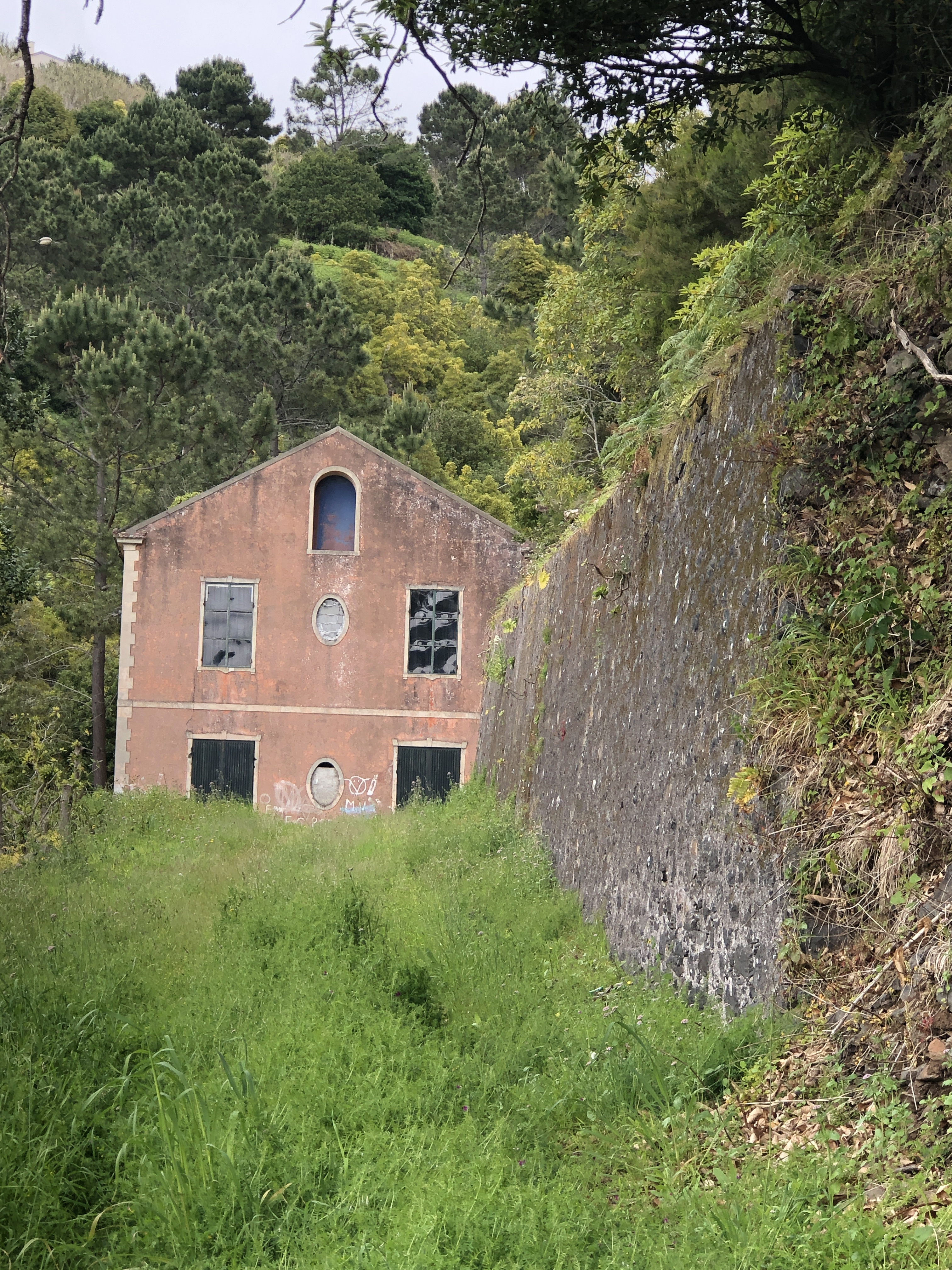 A fábrica de Manteiga da Fajã da Ovelha, foi construída no inicio do século XX, por volta do ano de 1910, por um senhor chamado Augusto César de Gouveia e o seu filho Pedro de Gouveia. Este senhor era um agricultor, foi uma pessoa muito importante, em que este prestou serviços à população, criou um cordão sanitário nos limites do concelho, impendido a propagação de uma febre que assolou a região nos finais do século XIX, que assim deste modo protegeu a Calheta. O senhor depois acabou por falecer, no Continente, onde estava a fazer tratamentos, acabou por ser trazido de volta para a Ilha da Madeira, onde foi enterrada na Fajã da Ovelha. 13 Seu filho acabou por ser o principal impulsionador da Fábrica da Manteiga, esta localiza-se no sítio de S. Lourenço, é constituída por dois andares. No primeiro andar era produzida a manteiga e na segunda era produzida a massa. Existe ainda uma furna de terra batida onde trabalhavam a folha para elaborar as latas para embalar a manteiga, “Manteiga Águia”. Depois com a II Guerra Mundial deixou de haver folha, então construíram uma serragem atrás da fábrica, em que passaram a elaborar caixas de madeira e a manteiga era embrulhada em papel de manteiga. Uma particularidade, esta fábrica foi o primeiro edifício na freguesia da Fajã da Ovelha a dispor de eletricidade, era produzida através da água que fazia mover os geradores. Esta fábrica foi muito importante para a economia da Fajã da Ovelha e da Ponta do Pargo, em que Manteiga era vendida para o Funchal e para o Continente. Com o passar dos anos a fábrica acabou por ser vendida acabando de deixar de funcionar em 1960, por fim foi vendida a um americano em 1974. Hoje em dia esta à venda e abandonada.